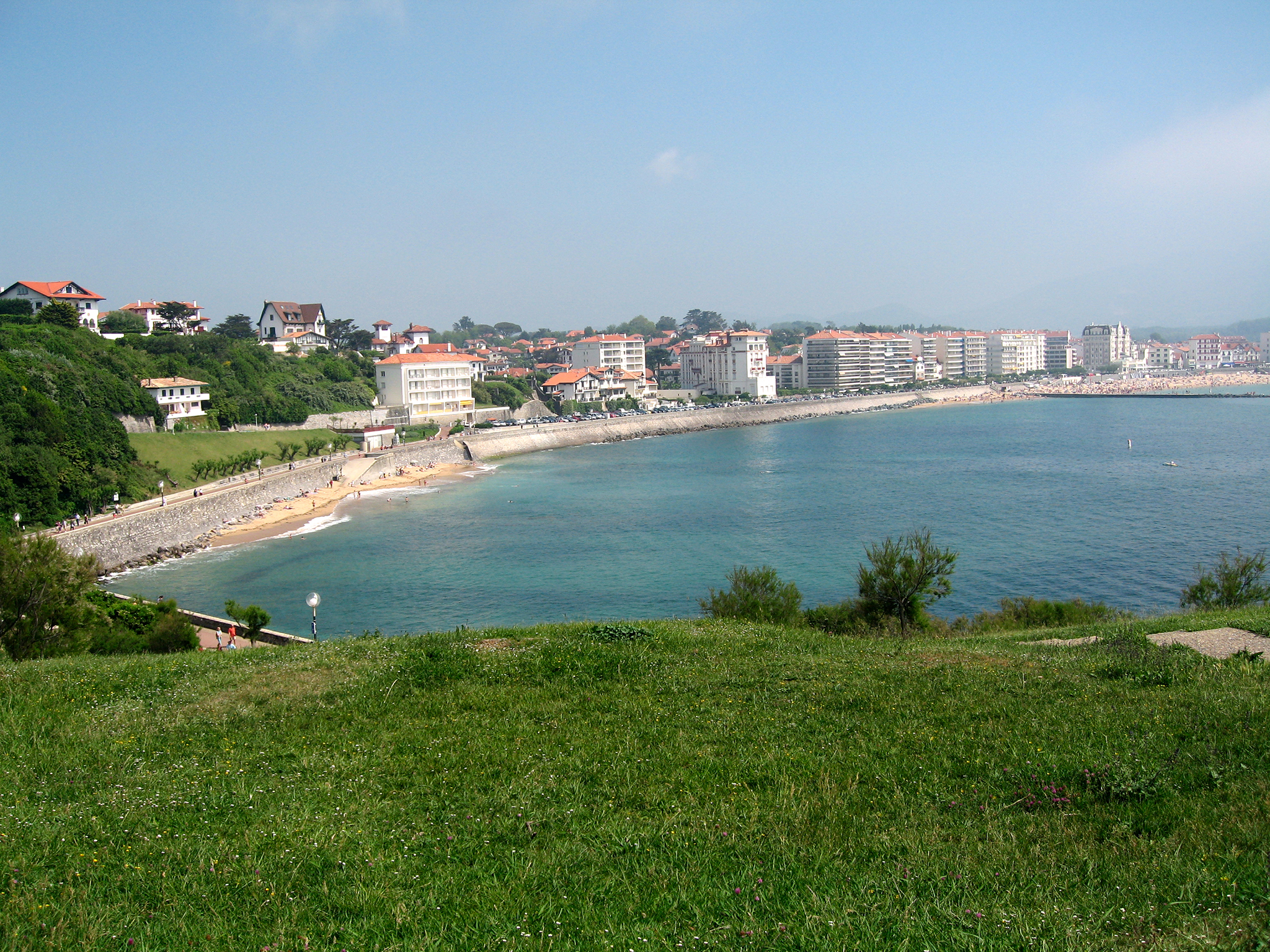 Saint-Jean-de-Luz, France.